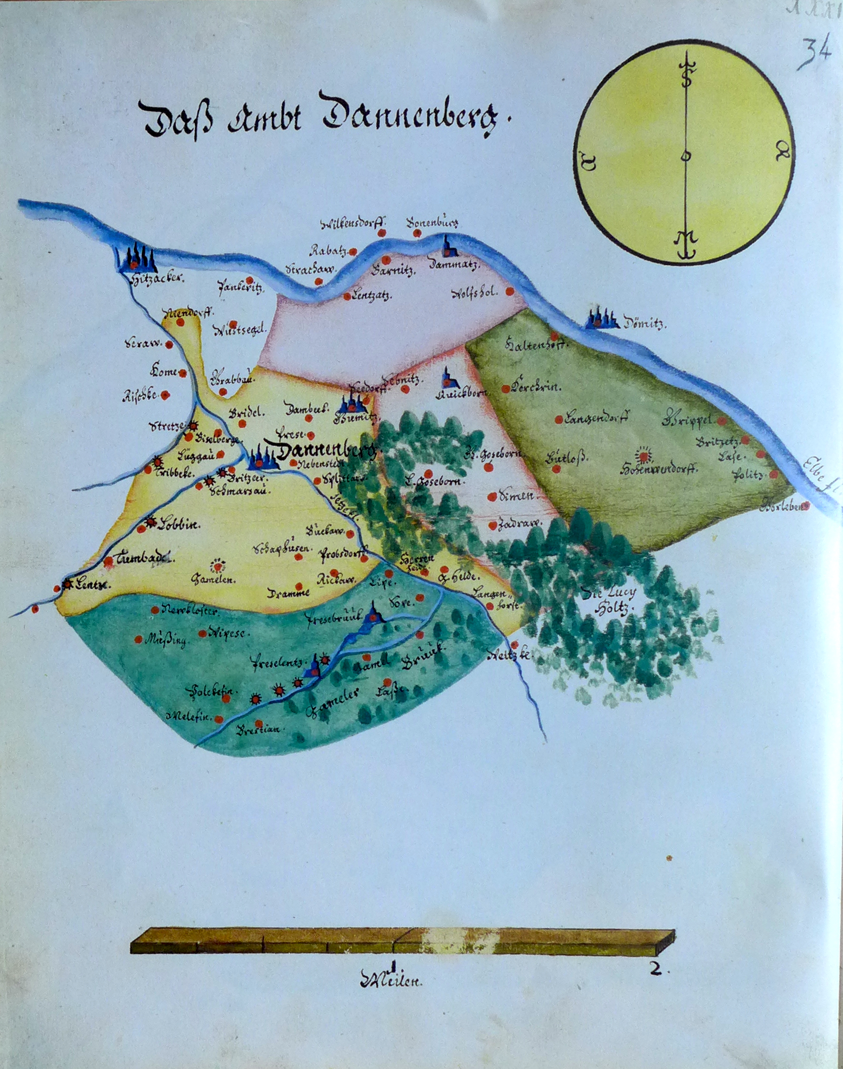 Ämteratlas des Fürstentums Lüneburg von Johannes Mellinger, um 1600 – Reproduktion der im Niedersächsischen Landesarchiv, Abteilung Hannover, lagernden Kopie um 1678 (vgl.